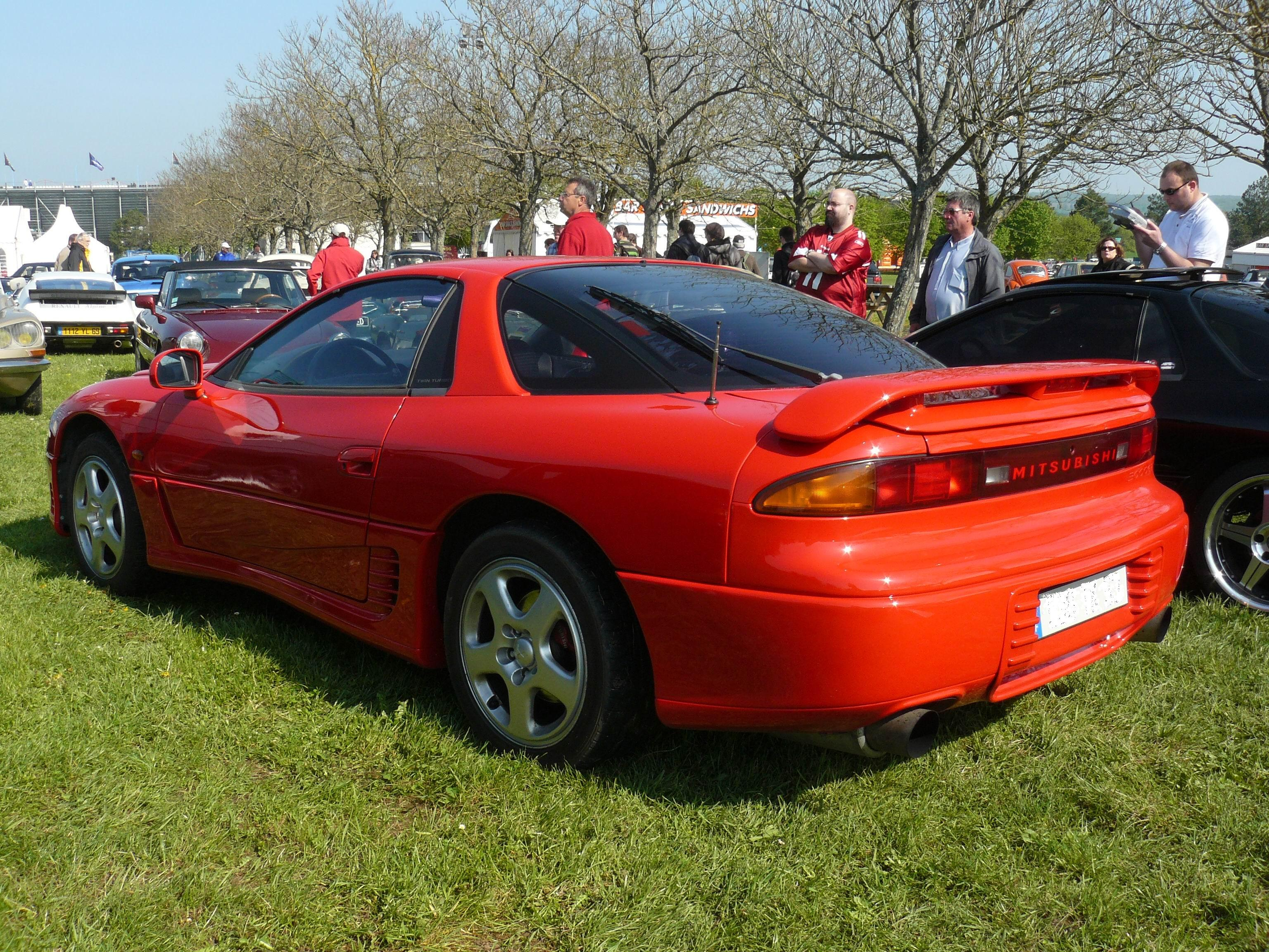 Classic Days 2013.